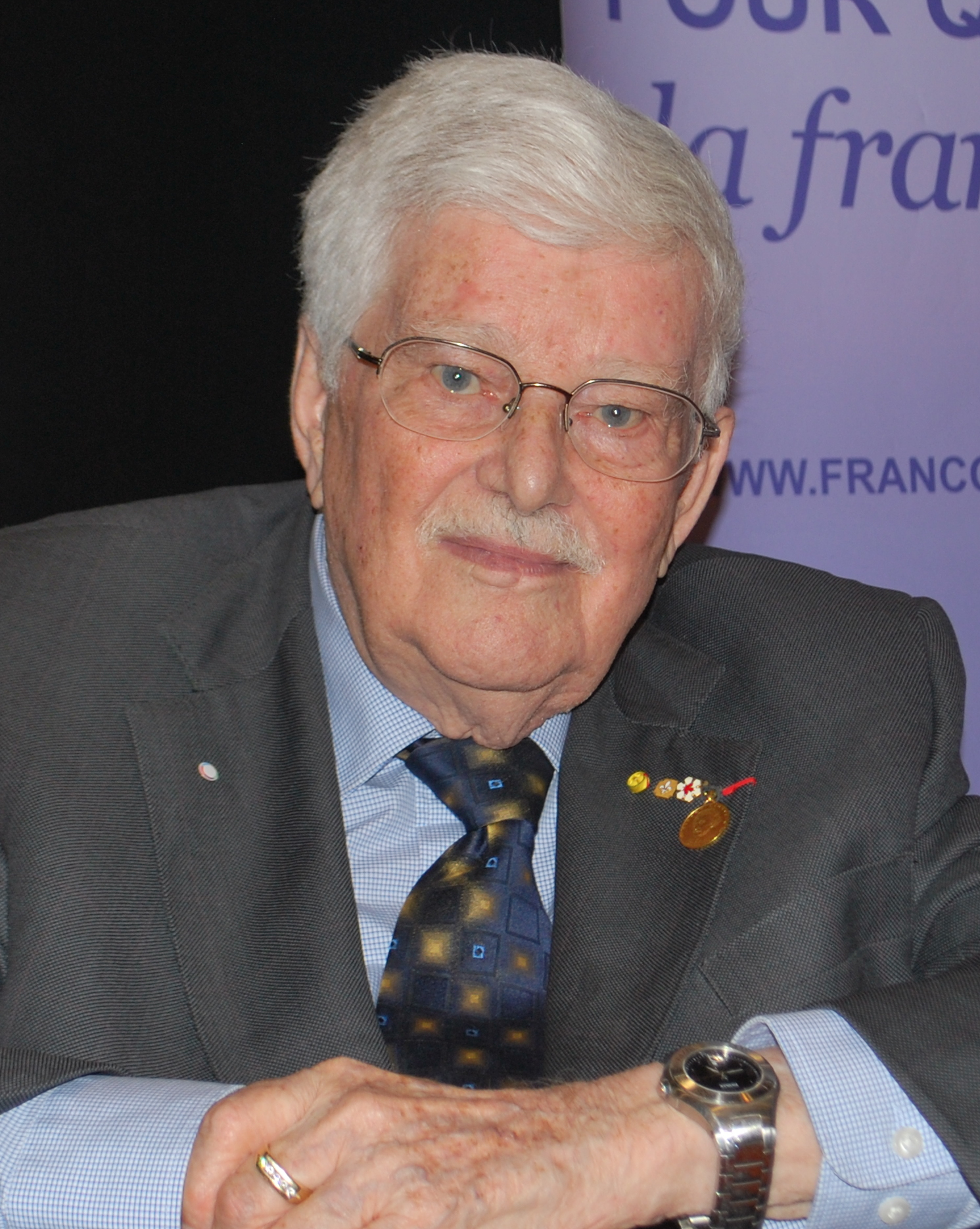 Paul Gérin-Lajoie au Forum mondial de la langue française.